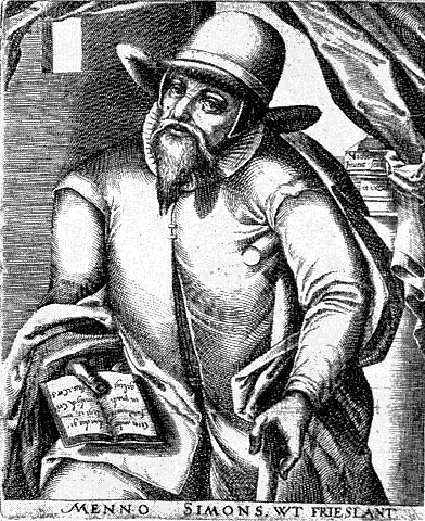 Menno Simons, 1610. Christoffel van Sichem. University Library, Amsterdam.